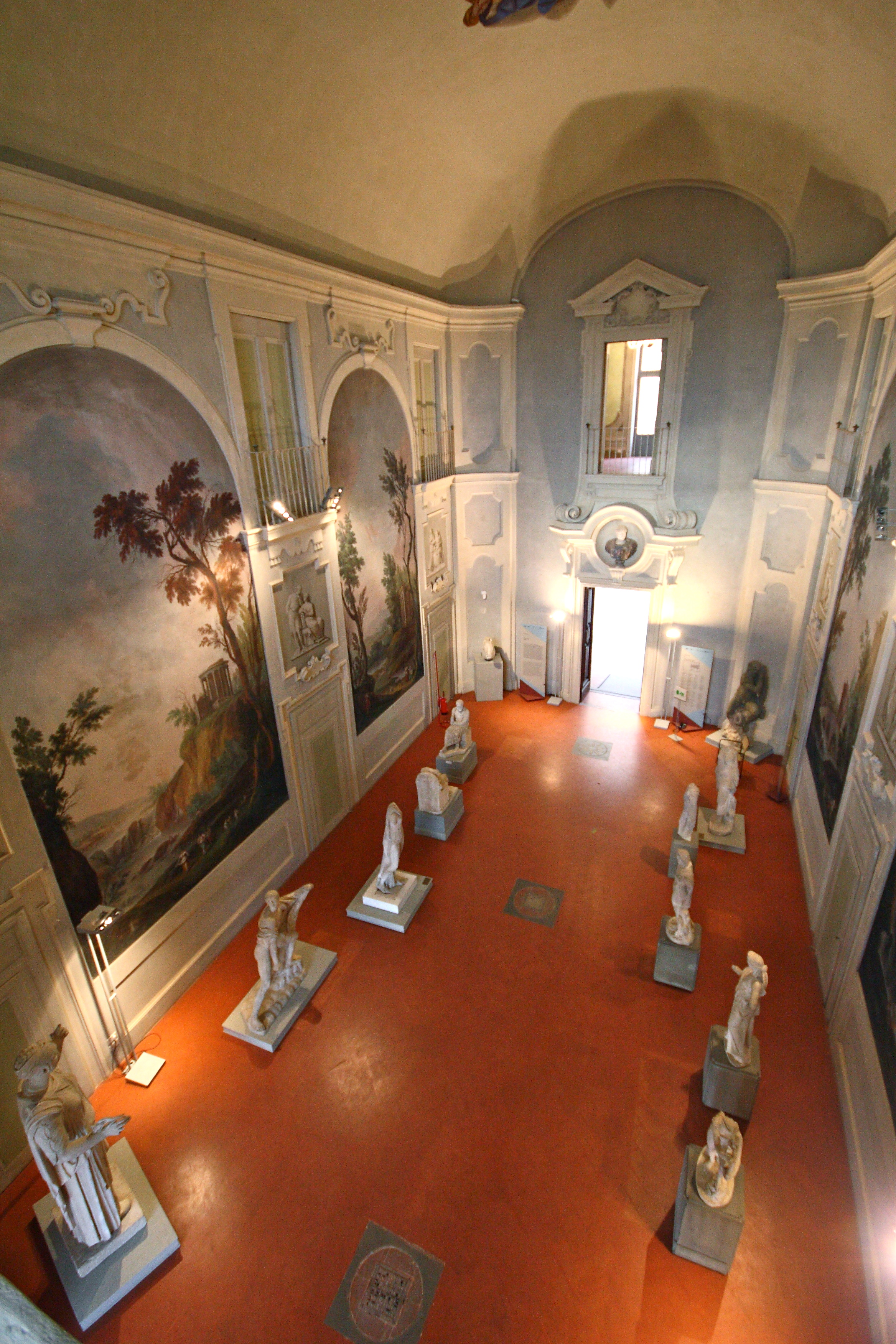 Villa Corsini a Castello - MIBAC This is a photo of a monument which is part of cultural heritage of Italy.